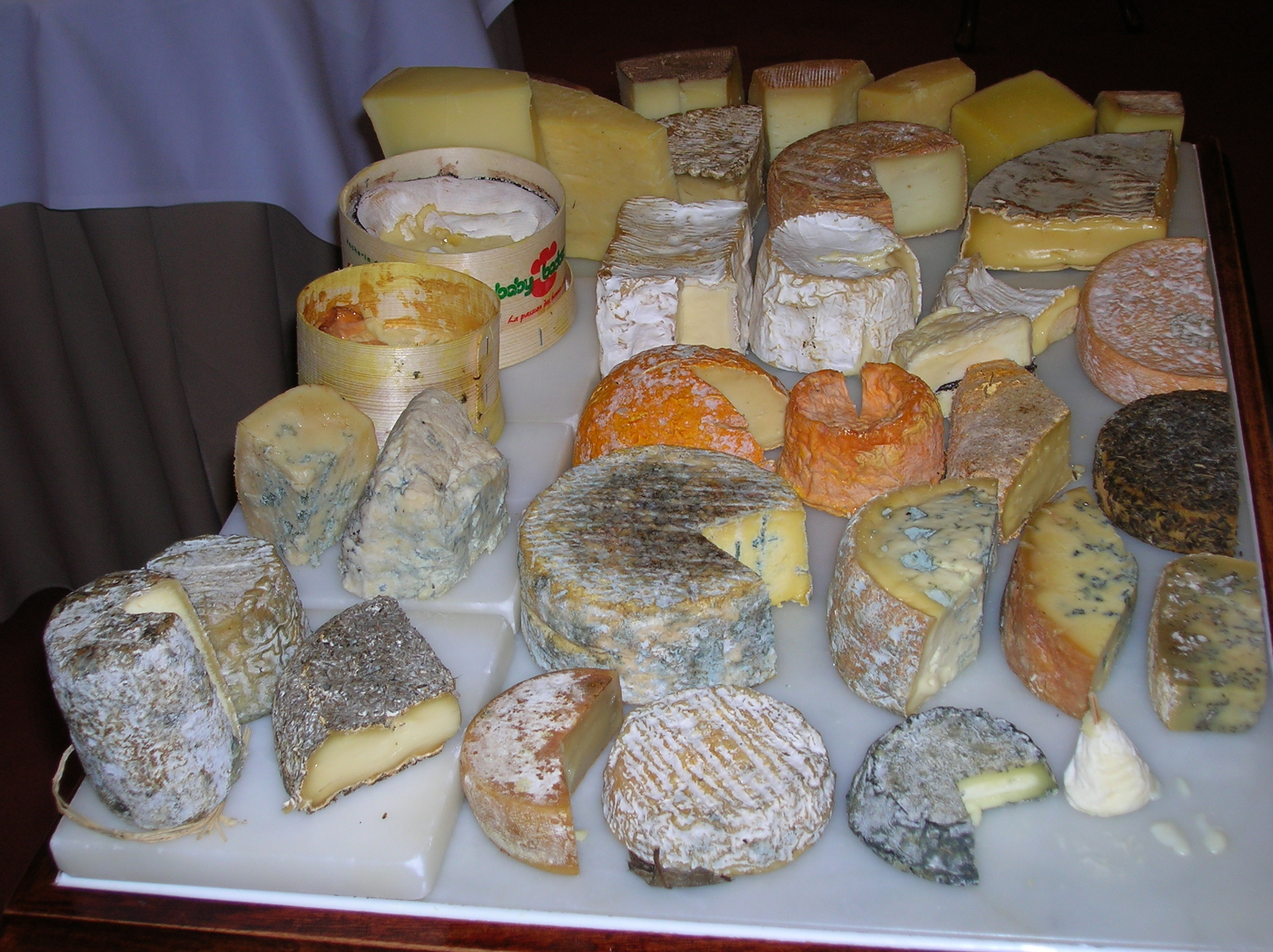 עגלת הגבינות במסעדת הדגל של גורדון רמזי